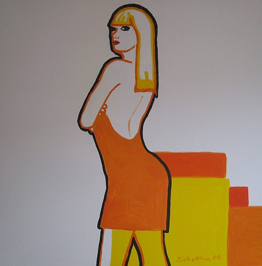 orange dresslabel QS:Len,"orange dress" label QS:Lde,"Oranges Kleid"